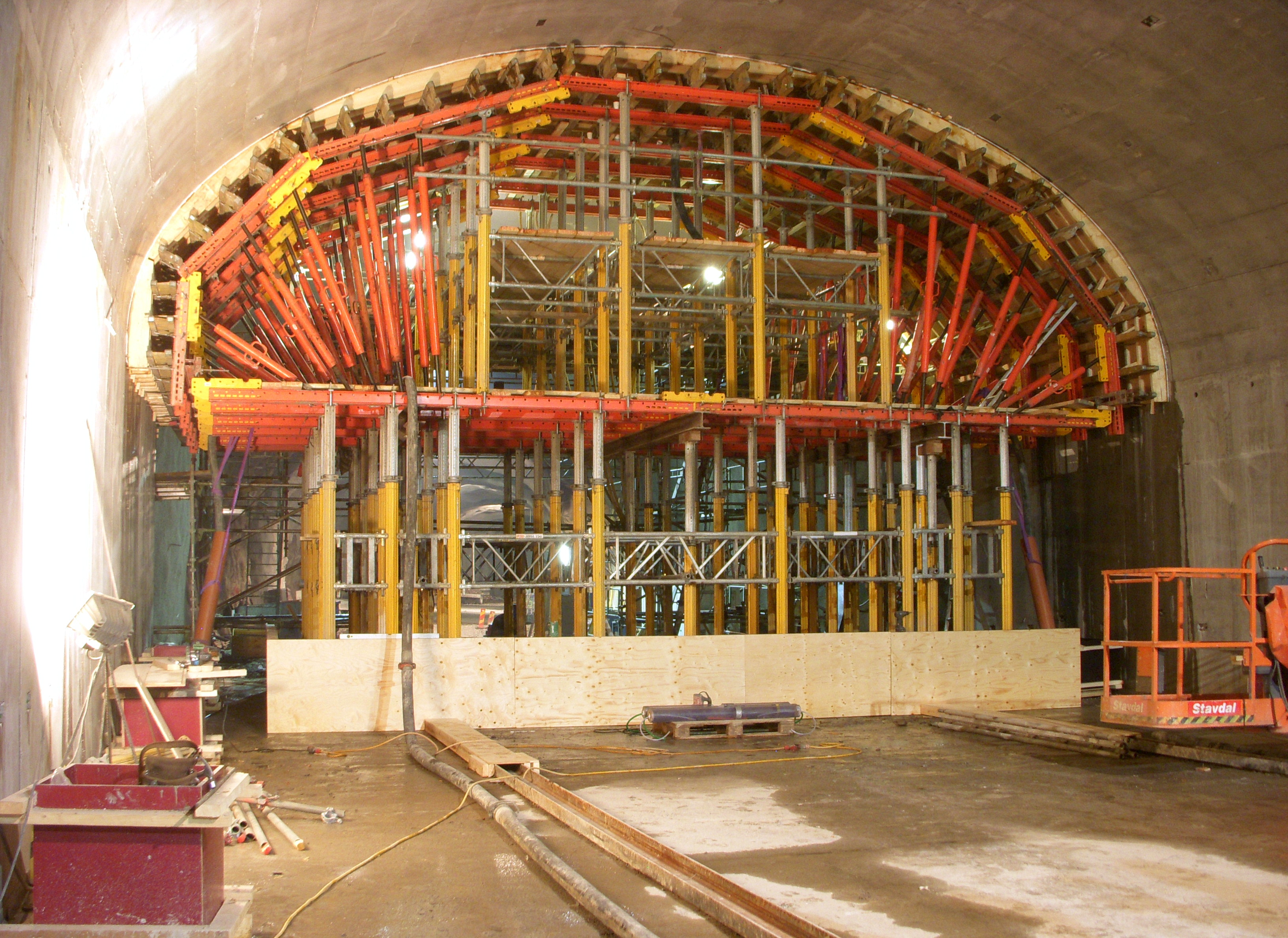 Södermalmstunneln